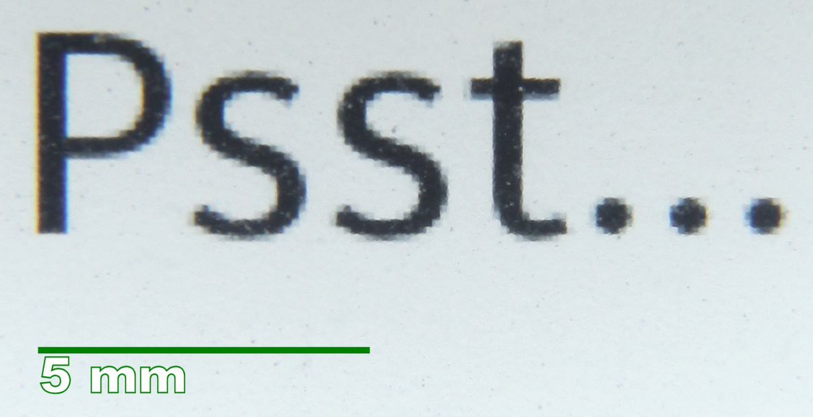 E-Paper Schrift Standby-Bildschirm